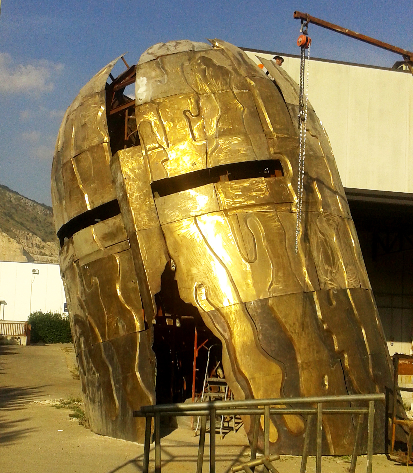 FIERAMOSCA info-point monument Fase di montaggio Anno 2016